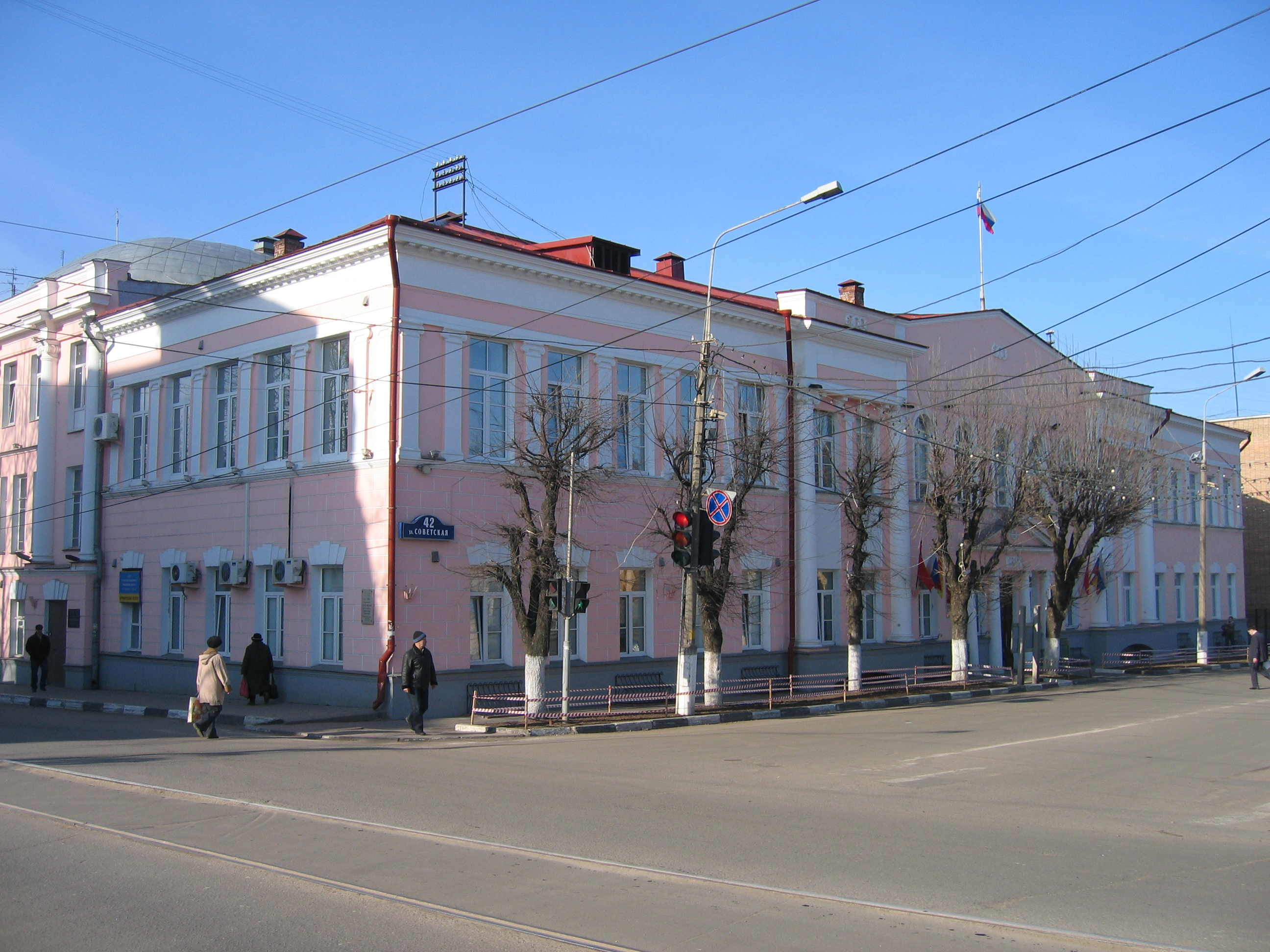 Stadtverwaltungsgebäude in Noginsk, Russland